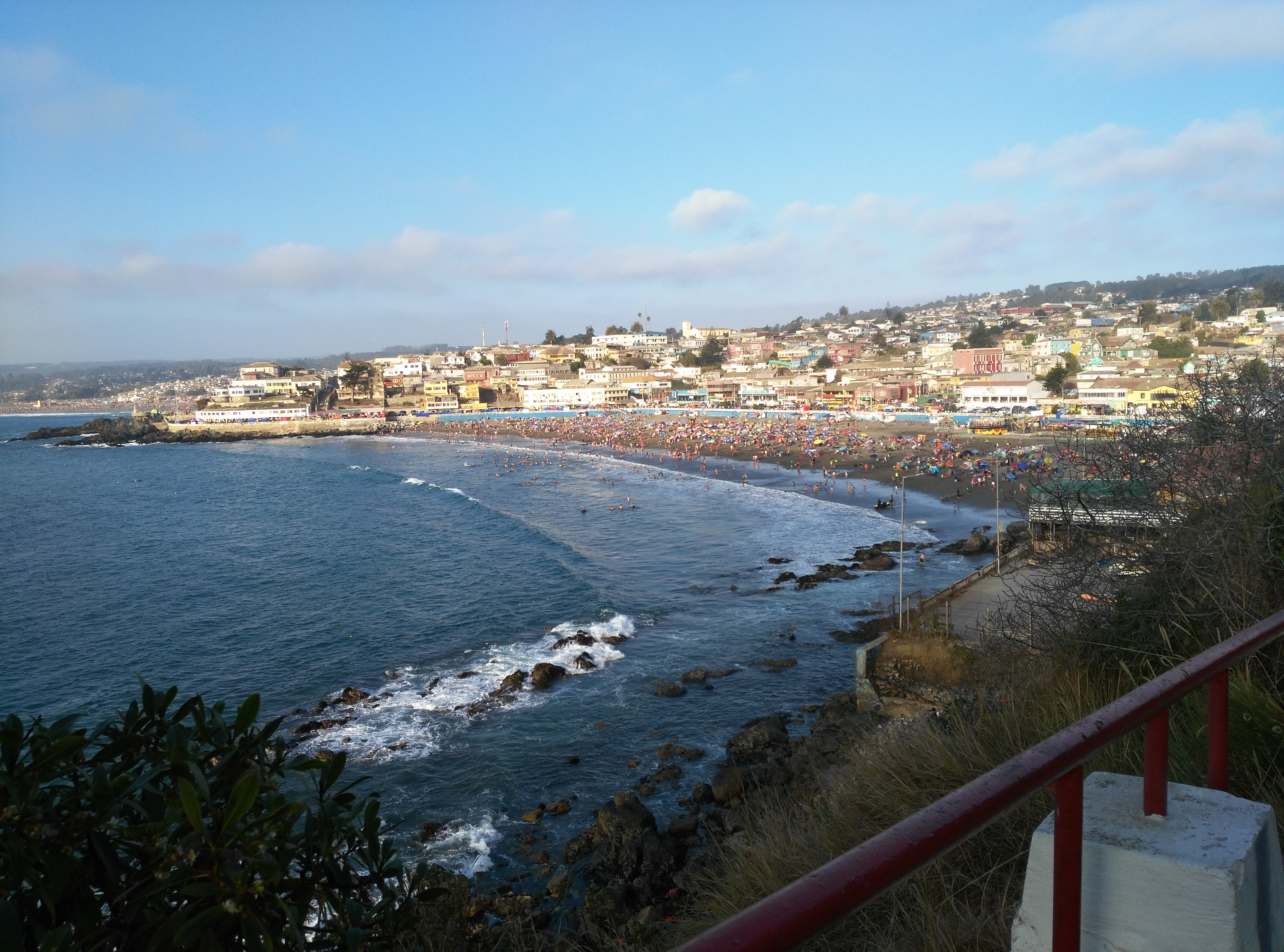 Vista de la Playa Chica.